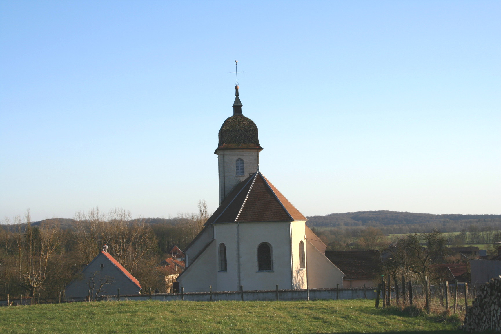 Vue de l'église de VANNE en Haute Saône